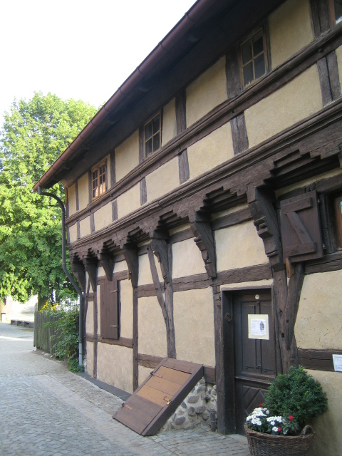 Das älteste Haus in Beeskow, Deutschland.